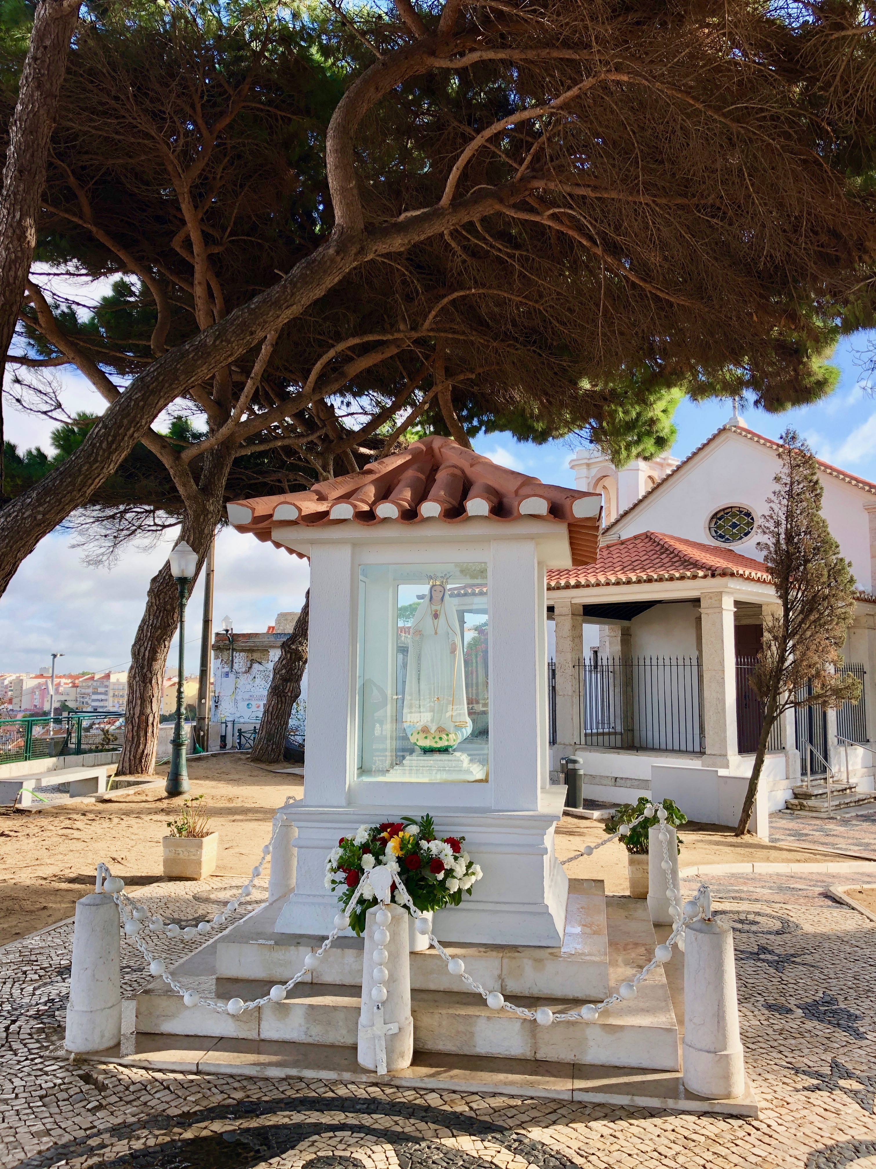 Lisboa, Portugal